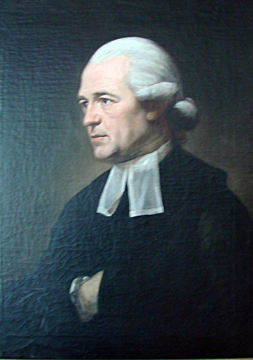 Gemälde Franz Volkmar Reinhard (1753–1812), deutscher evangelischer Theologe